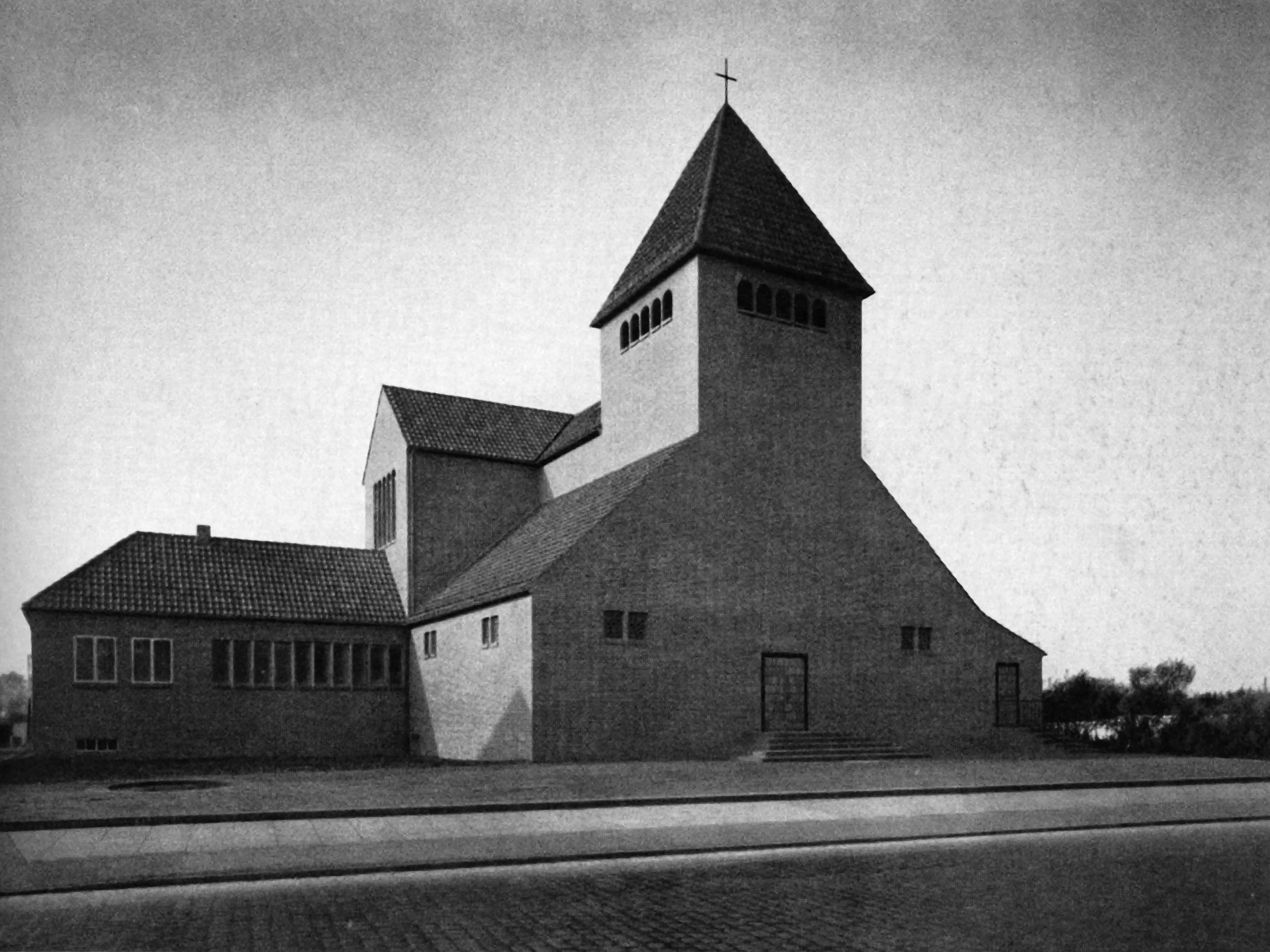 Herz-Jesu-Kirche in Bremen-Neustadt. Architekt: Dominikus Böhm